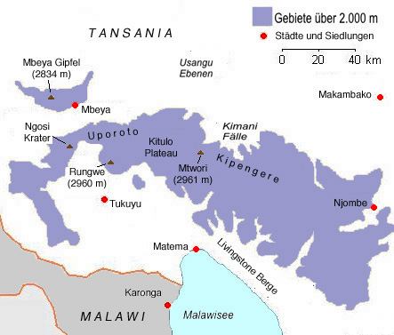 Karte des südlichen tansanischen Hochlandes Eigenproduktion Dr. Ferdinand Groeger 19.09.2006 hiermit für gemeinfrei erklärt ersetzt Kipengere.jpg, das hier auf irgendwelche Rechtprobleme stößt